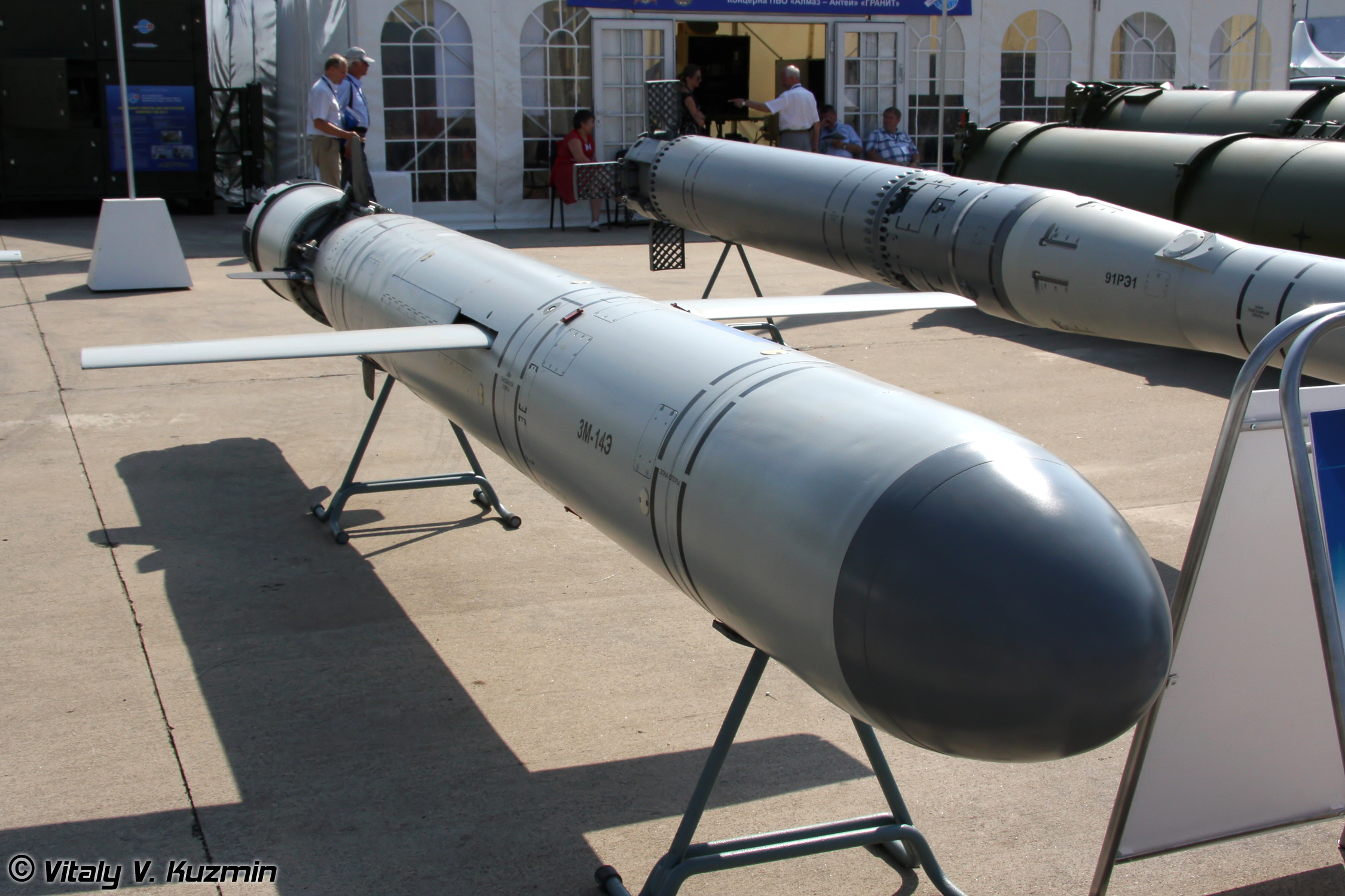 Ракета 3М-14Э для вооружения подводных лодок из состава интегрированной ракетной системы Калибр-ПЛЭ/Club-S предназначена для уничтожения наземных целей